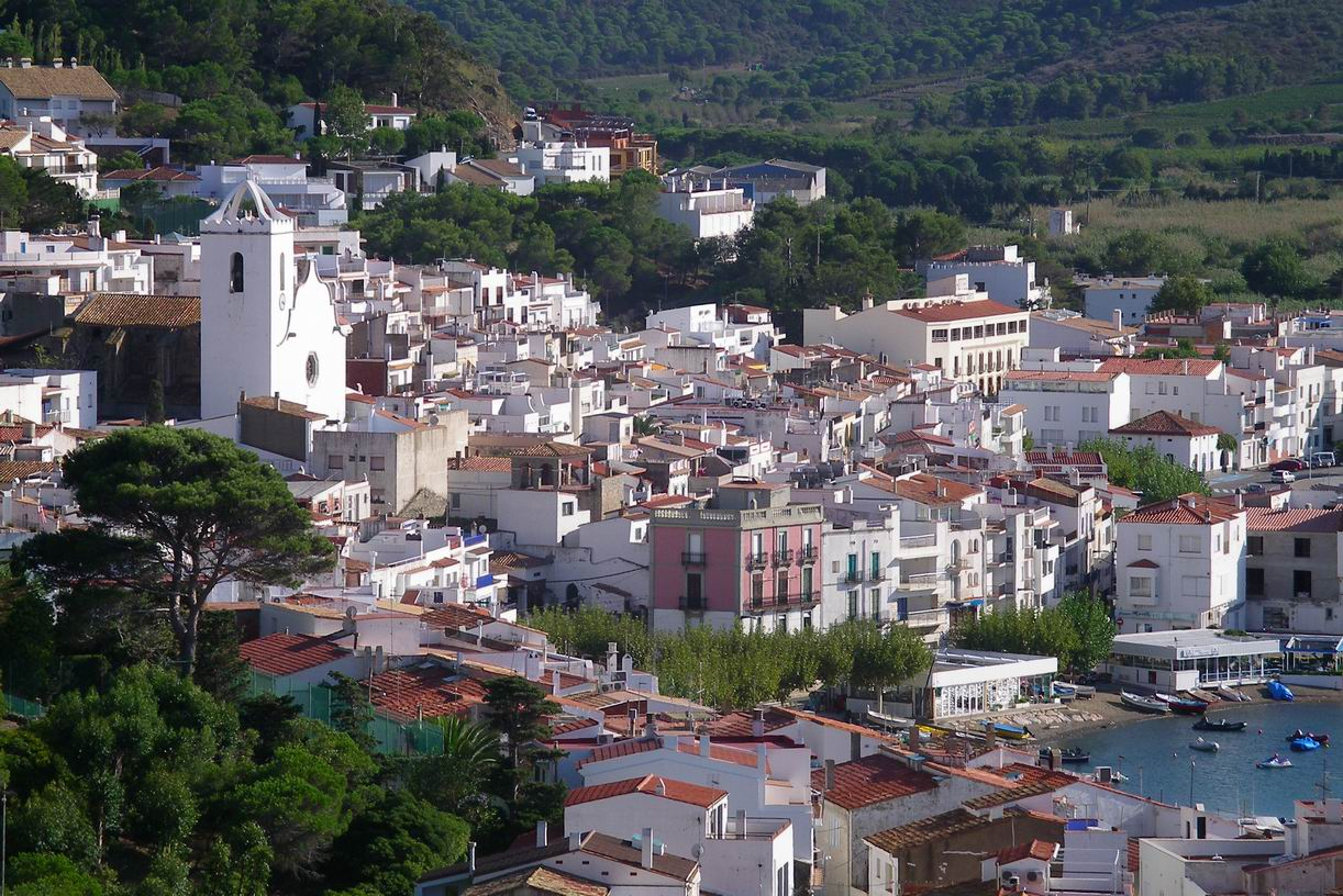 Stadtansicht von El Port de la Selva